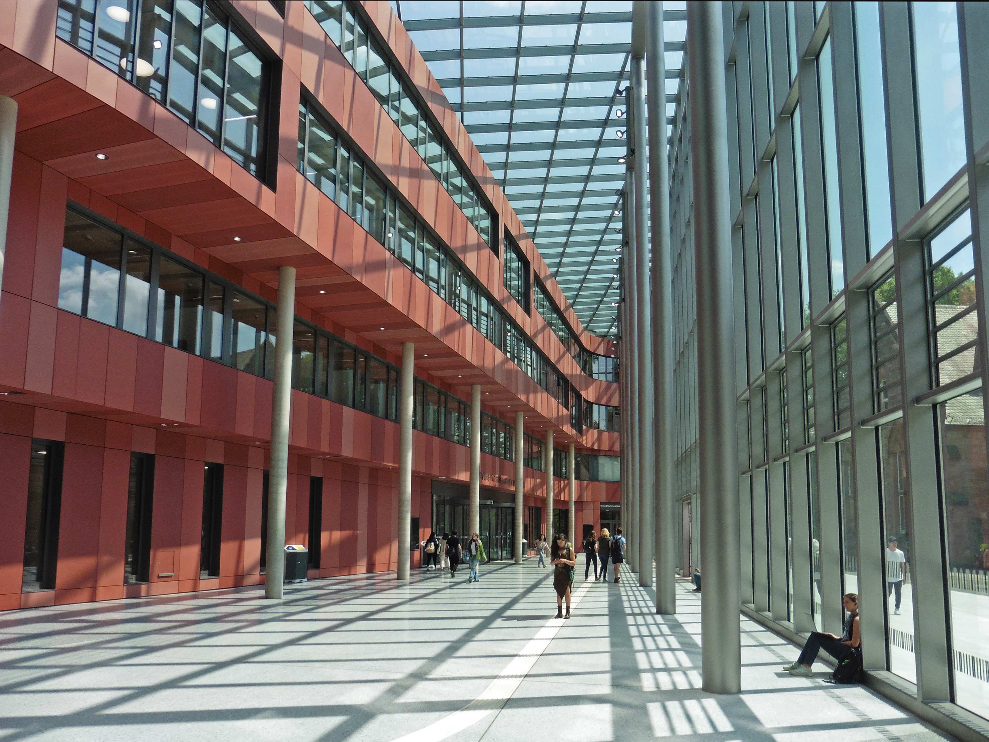 Neubau der Universitätsbibliothek in Marburg, Atrium Eingang Alter Botanischer Garten. Ansicht von Westen.